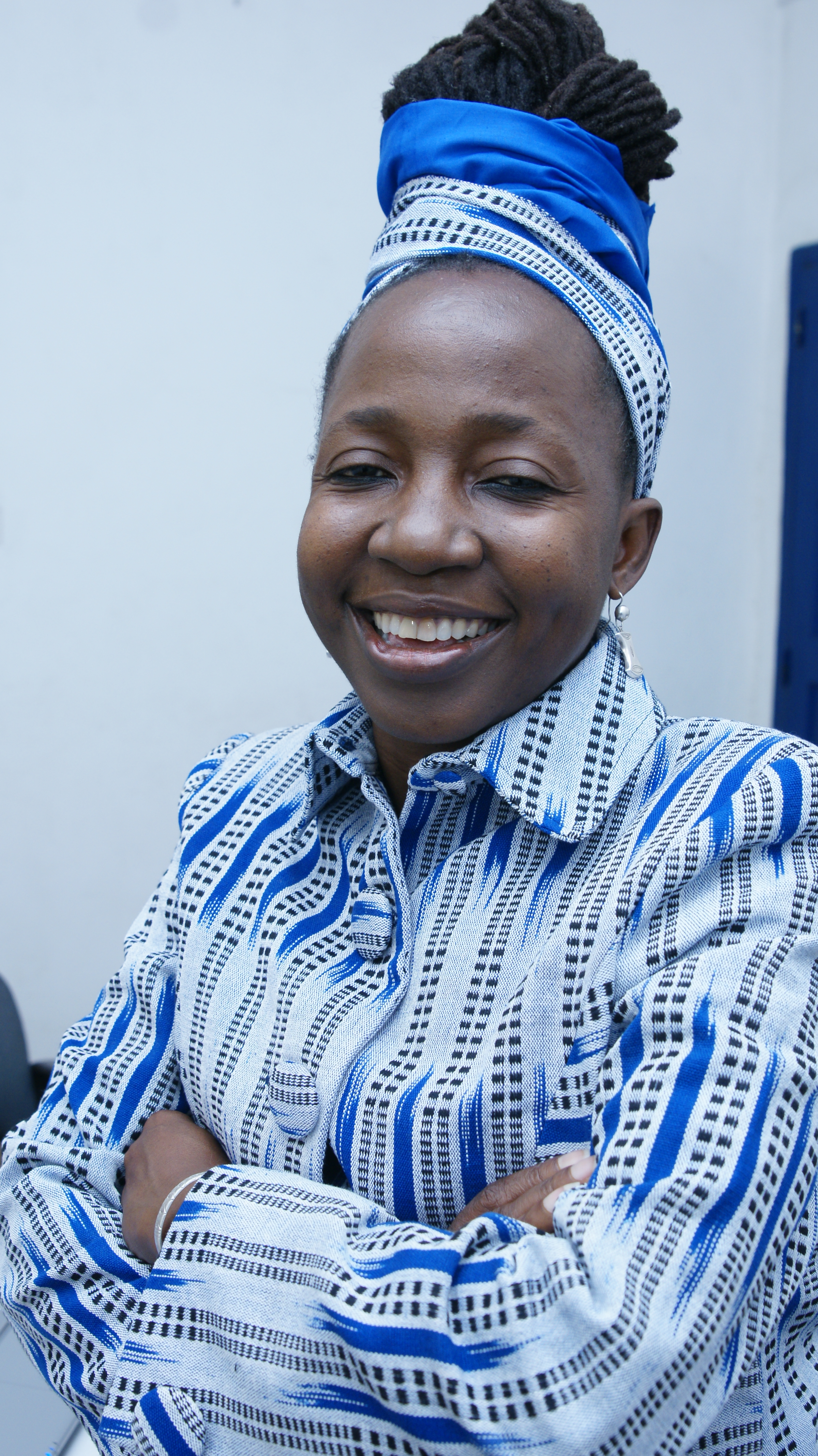 Femme politique camerounaise